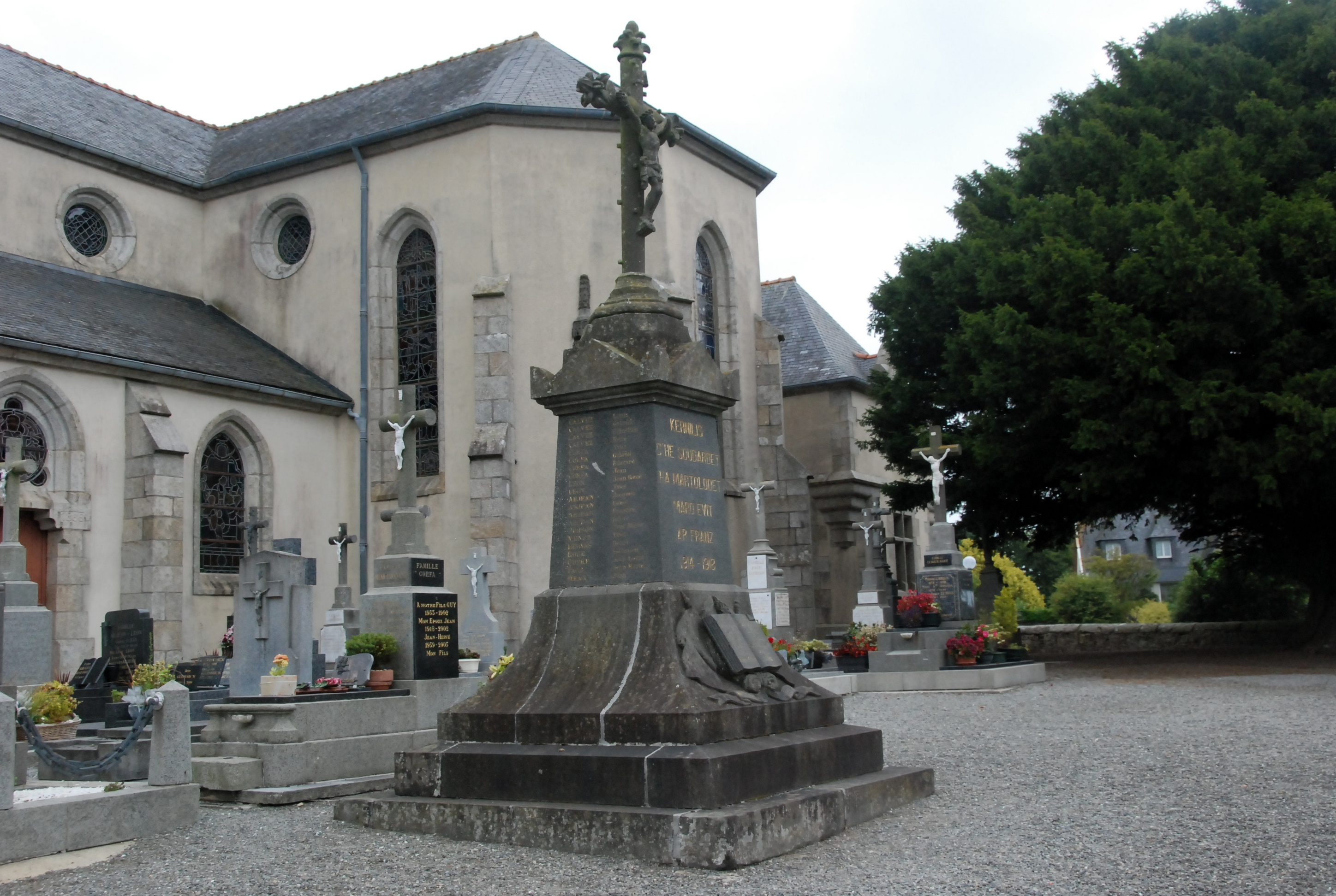 Monument aux morts - Kernilis-29